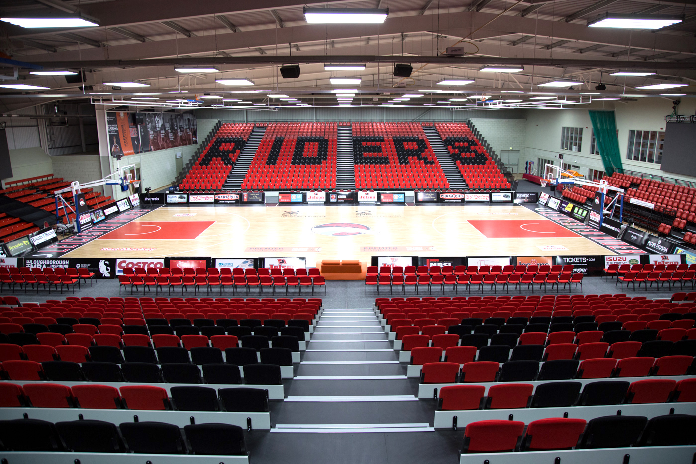 Leicester Arena : Leicester Riders